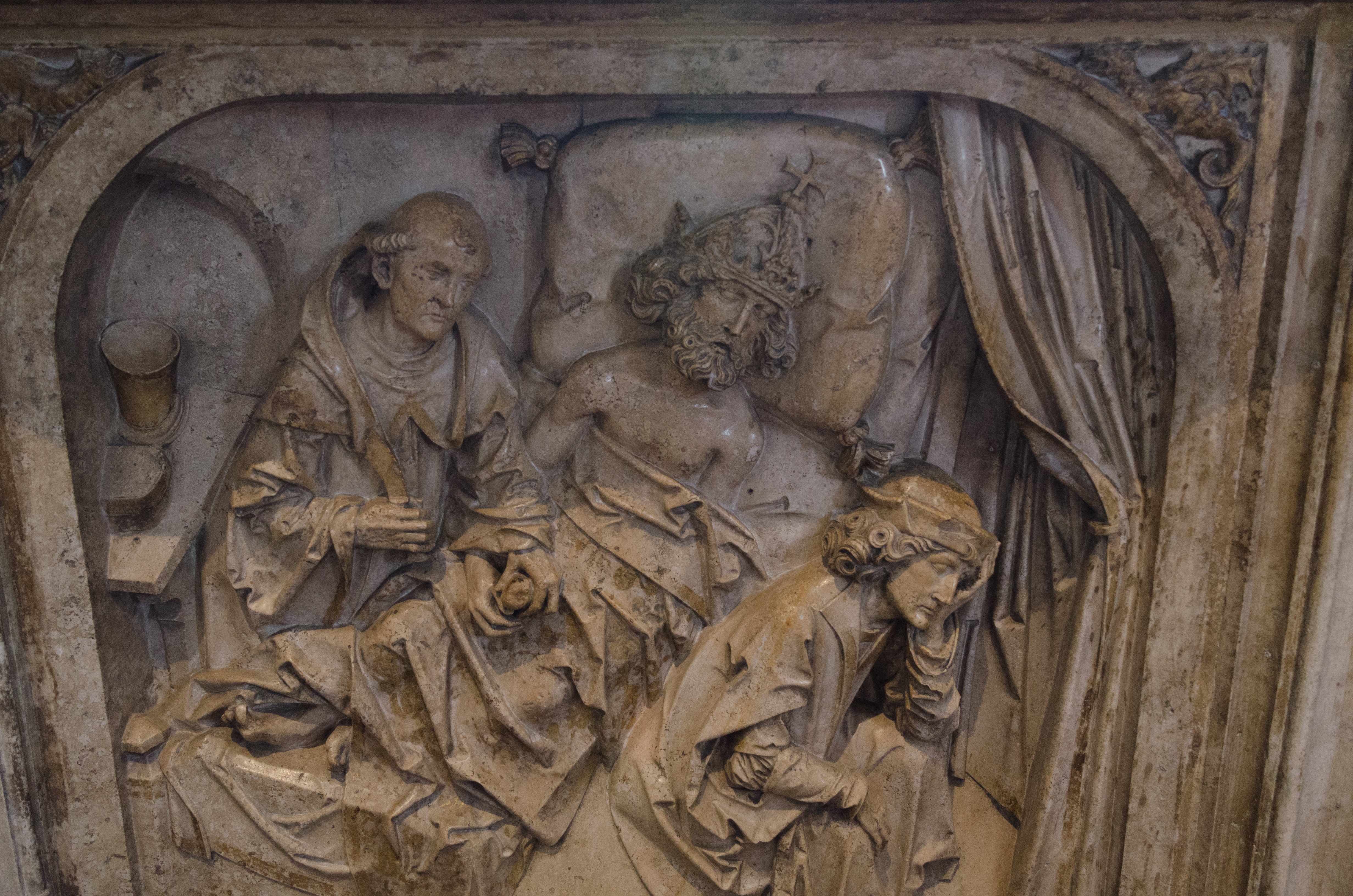 Bamberger Dom